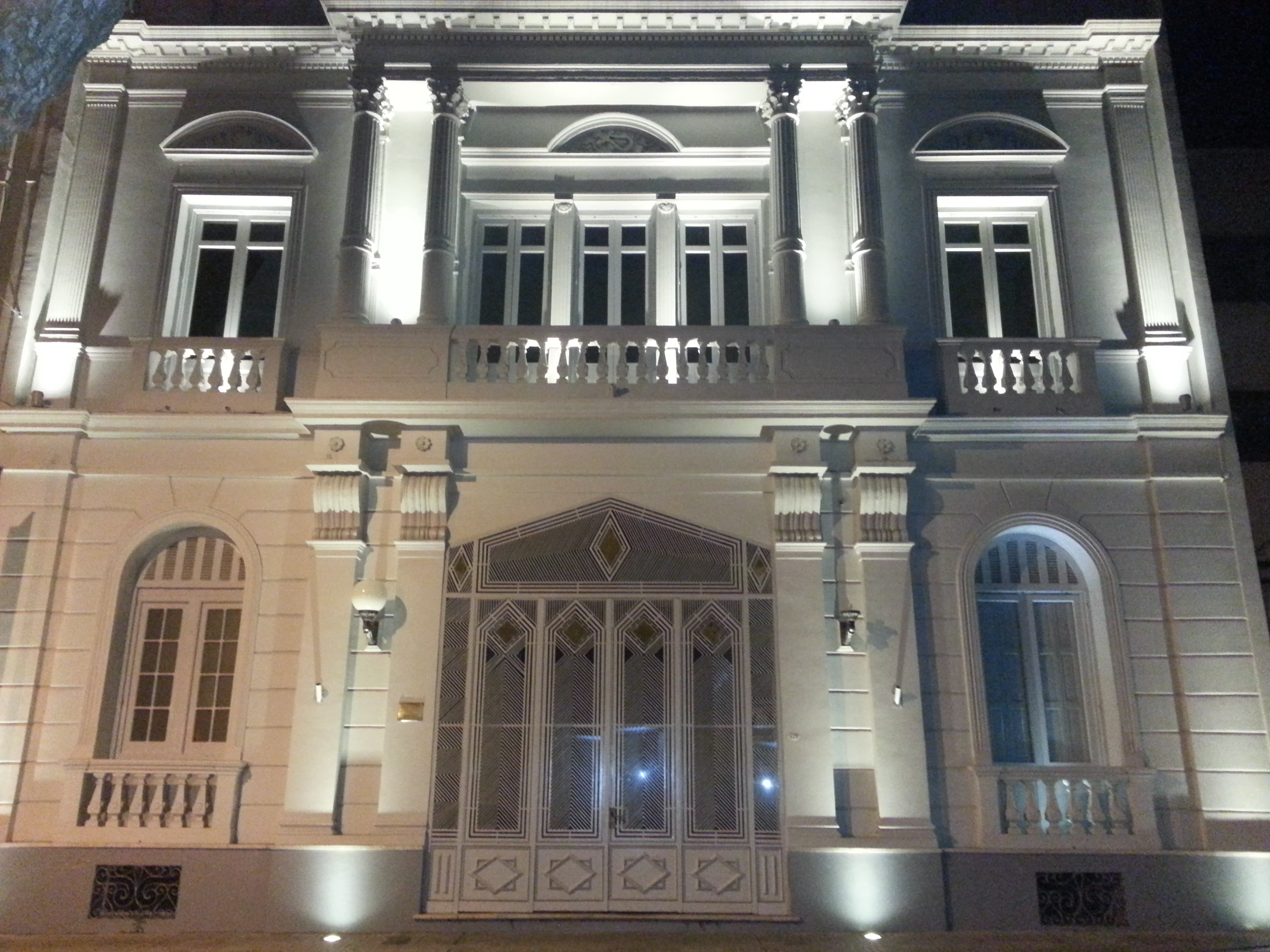 Ateneo de Salto